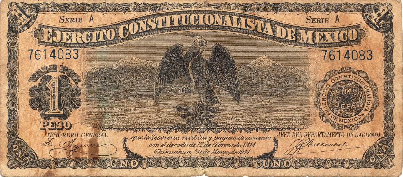 Billete de 1 peso del Ejército Constitucionalista de México emitido en 1914.